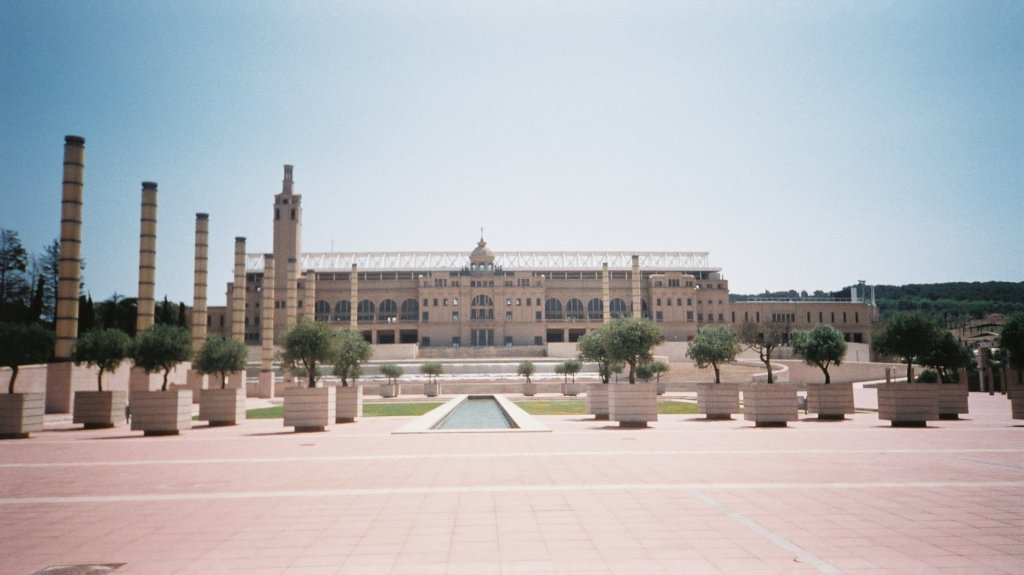 Stade olympique de Bercelone